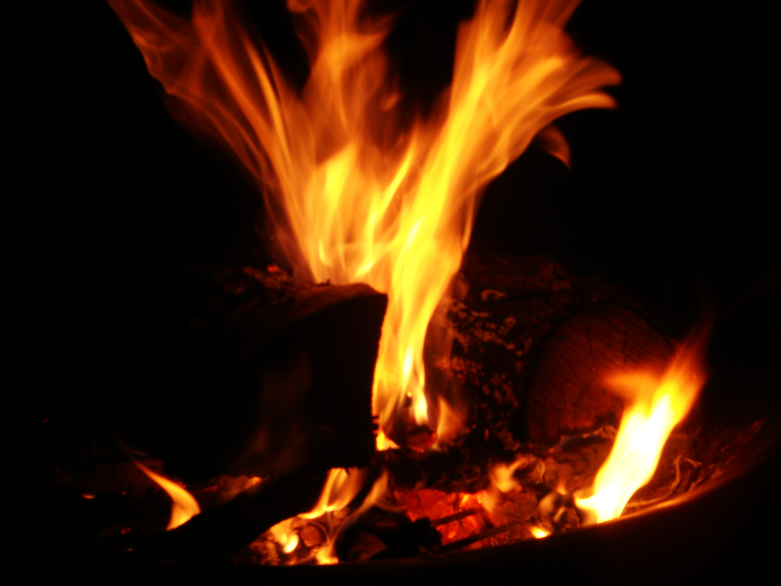 sooc